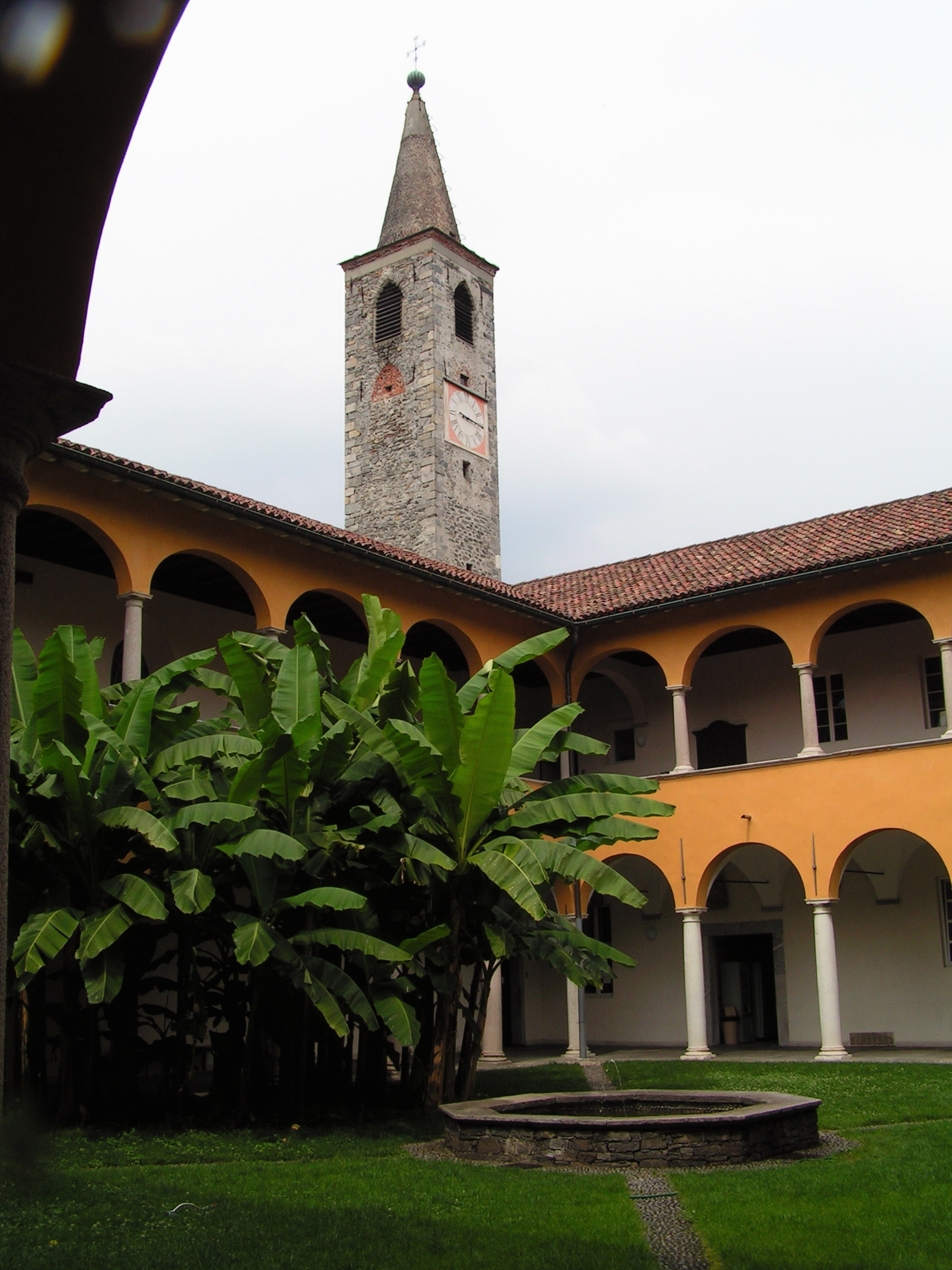 Via delle Cappelle 1, Ascona. Torre della chiesa di S. Maria della Misericordia e Collegio Papio.